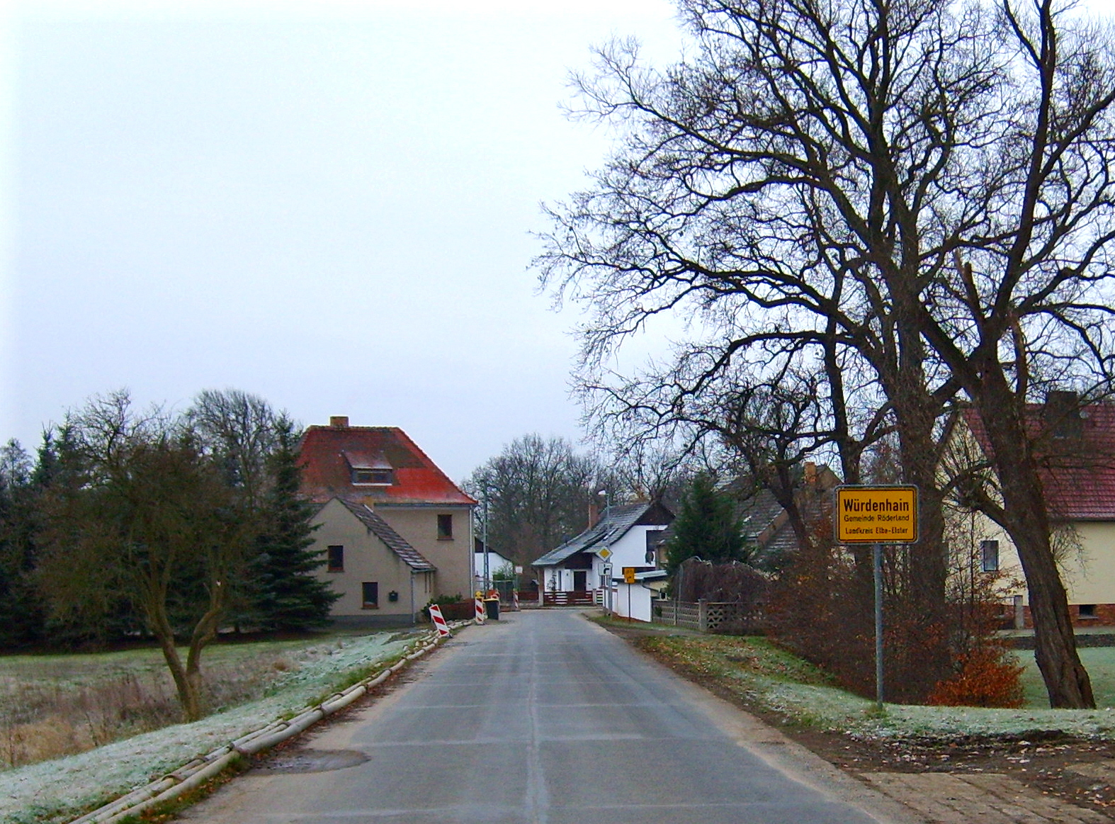 Würdenhain